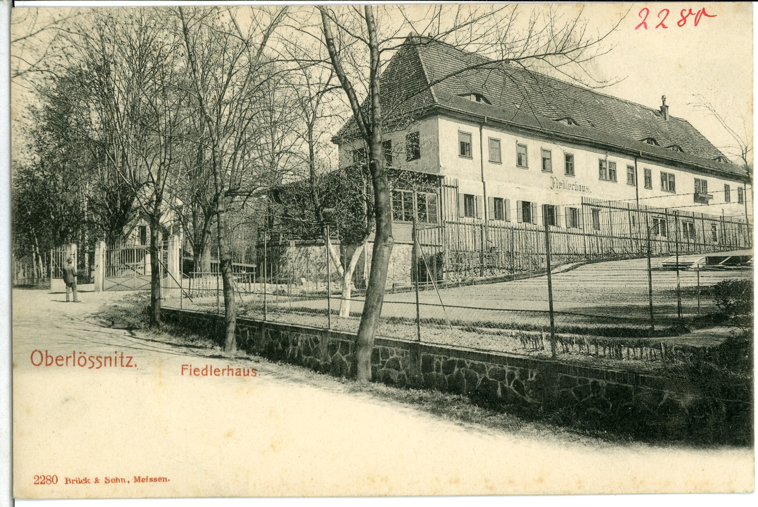 Oberlößnitz; Fiedlerhaus This postcard is from publisher Brück & Sohn in Meißen ( postcard has a unique number 02280 and is available in a higher resolution at the publisher. This images was uploaded in a cooperation project between Wikipedians and the publisher.